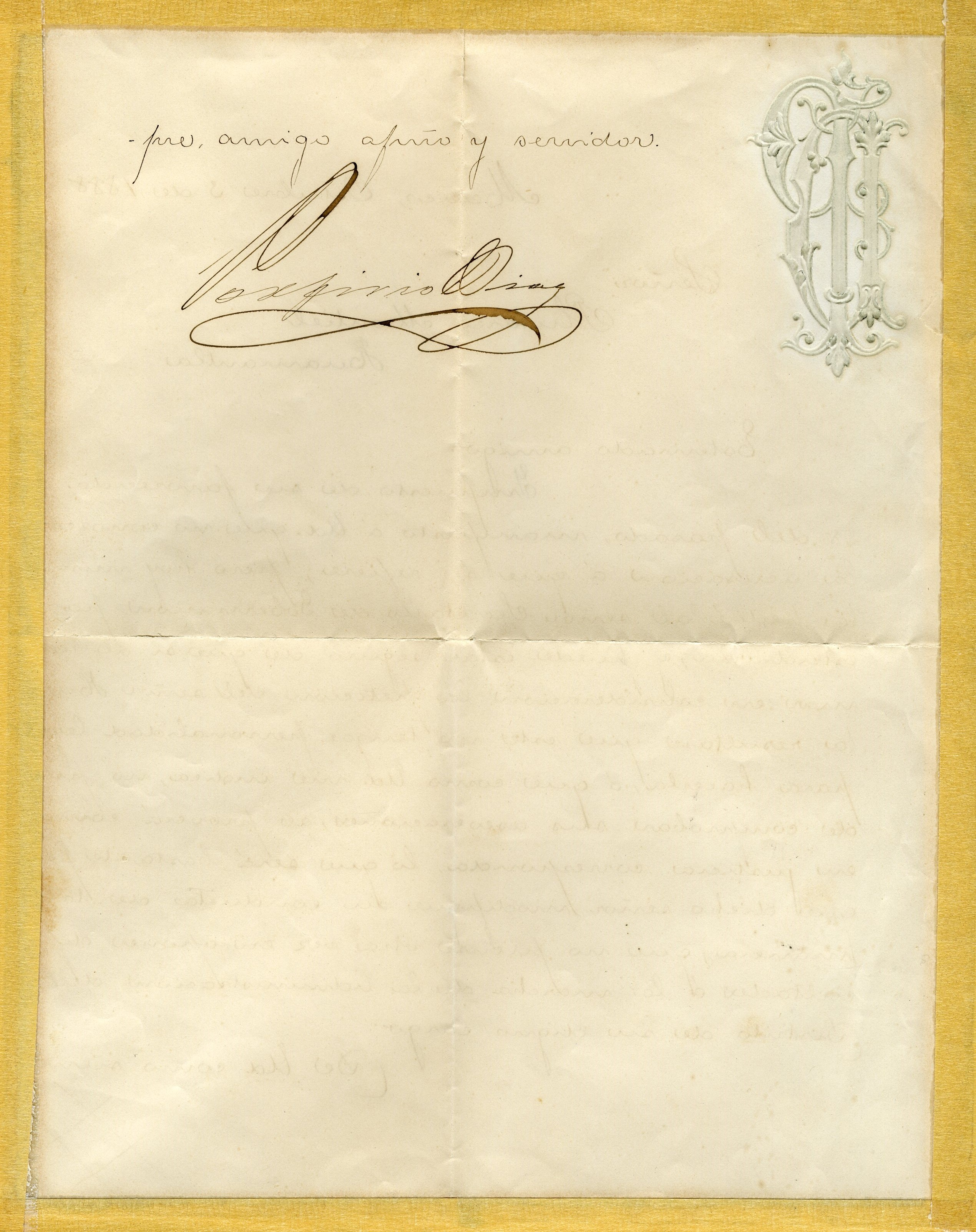 Segunda parte de la carta escrita por Porfirio Diaz al General Plutarco Montiel sobre la situacion de su gobierno.